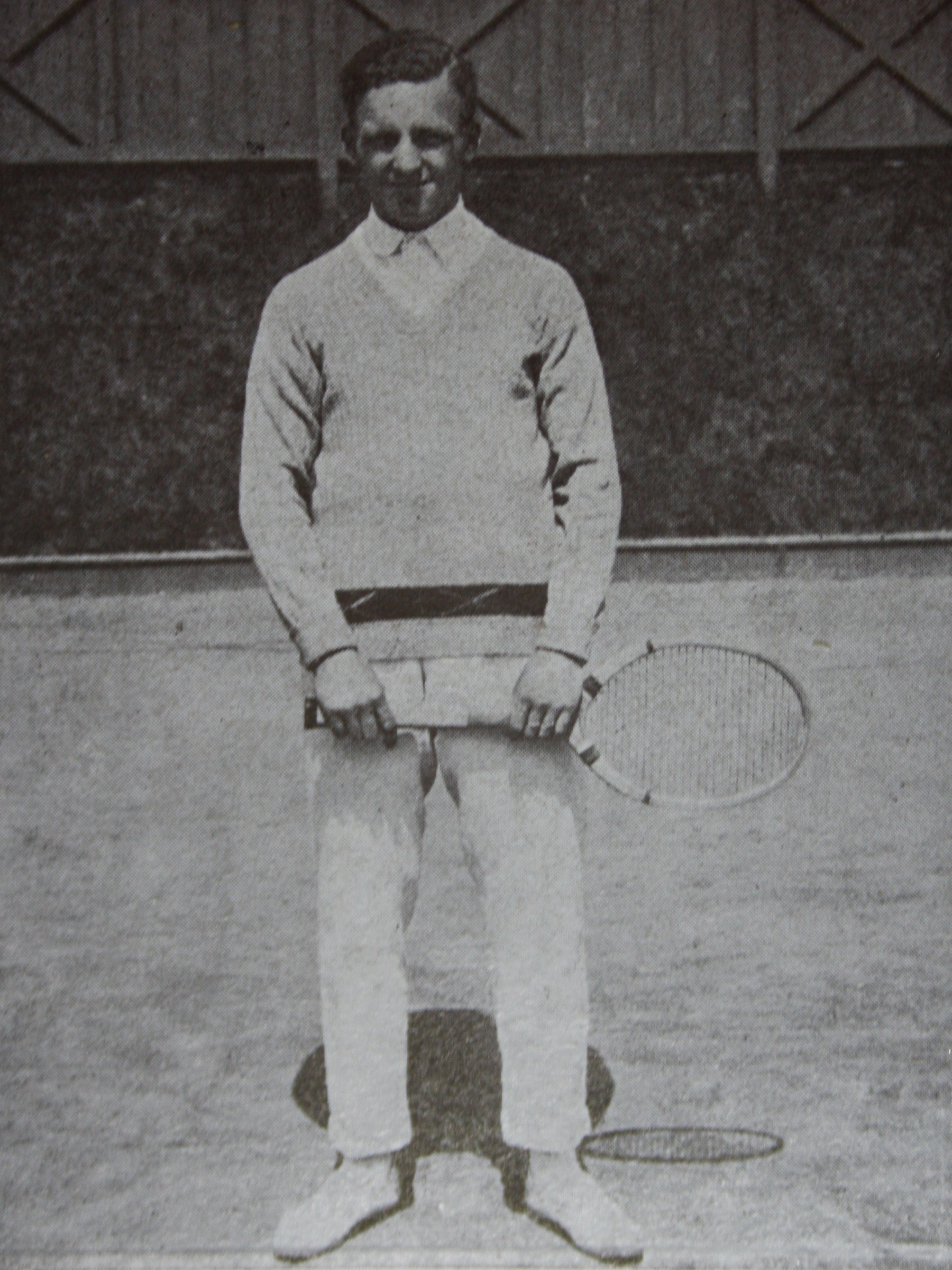 Jan Koželuh